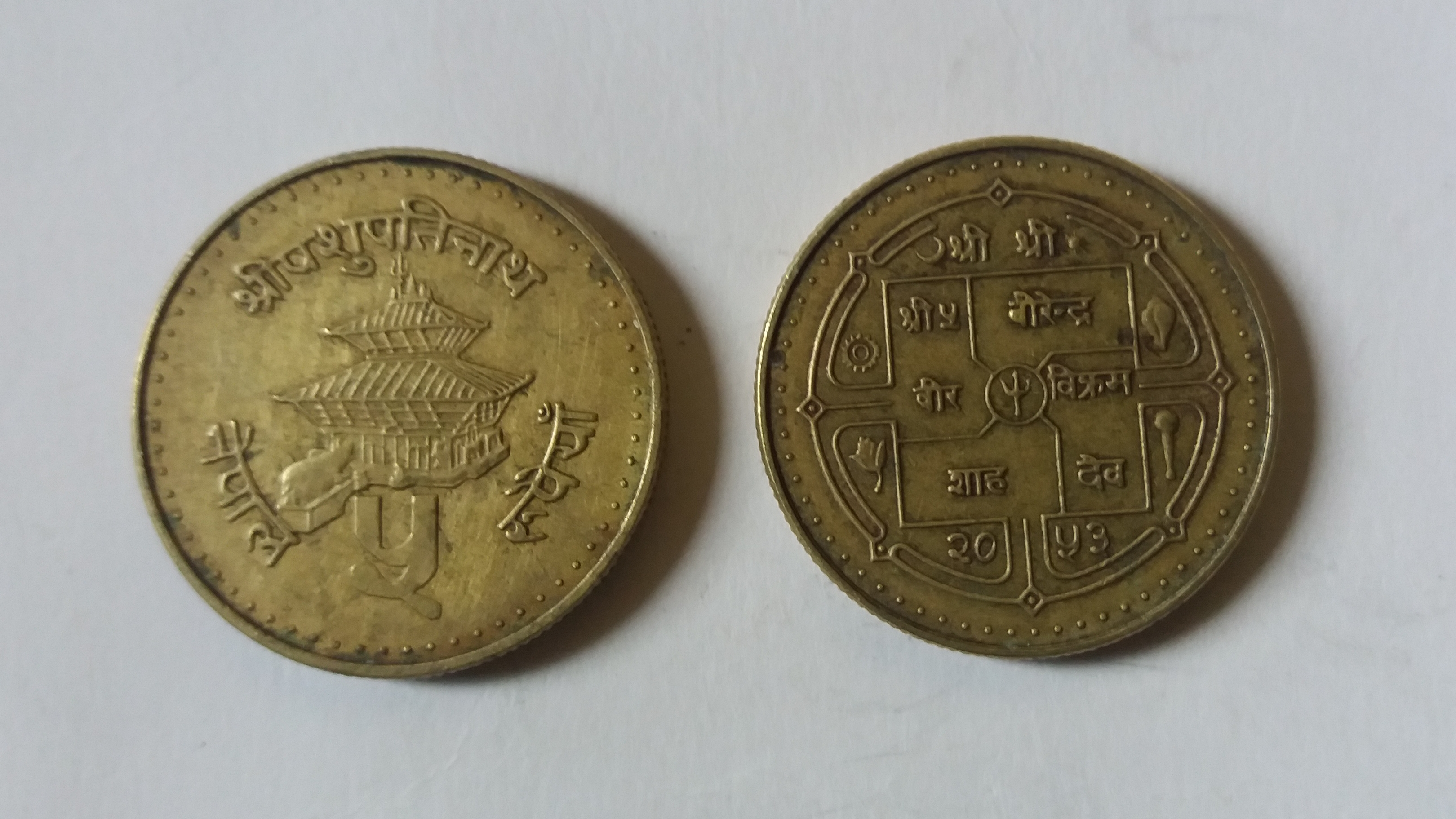 नेपाली: Five rupese